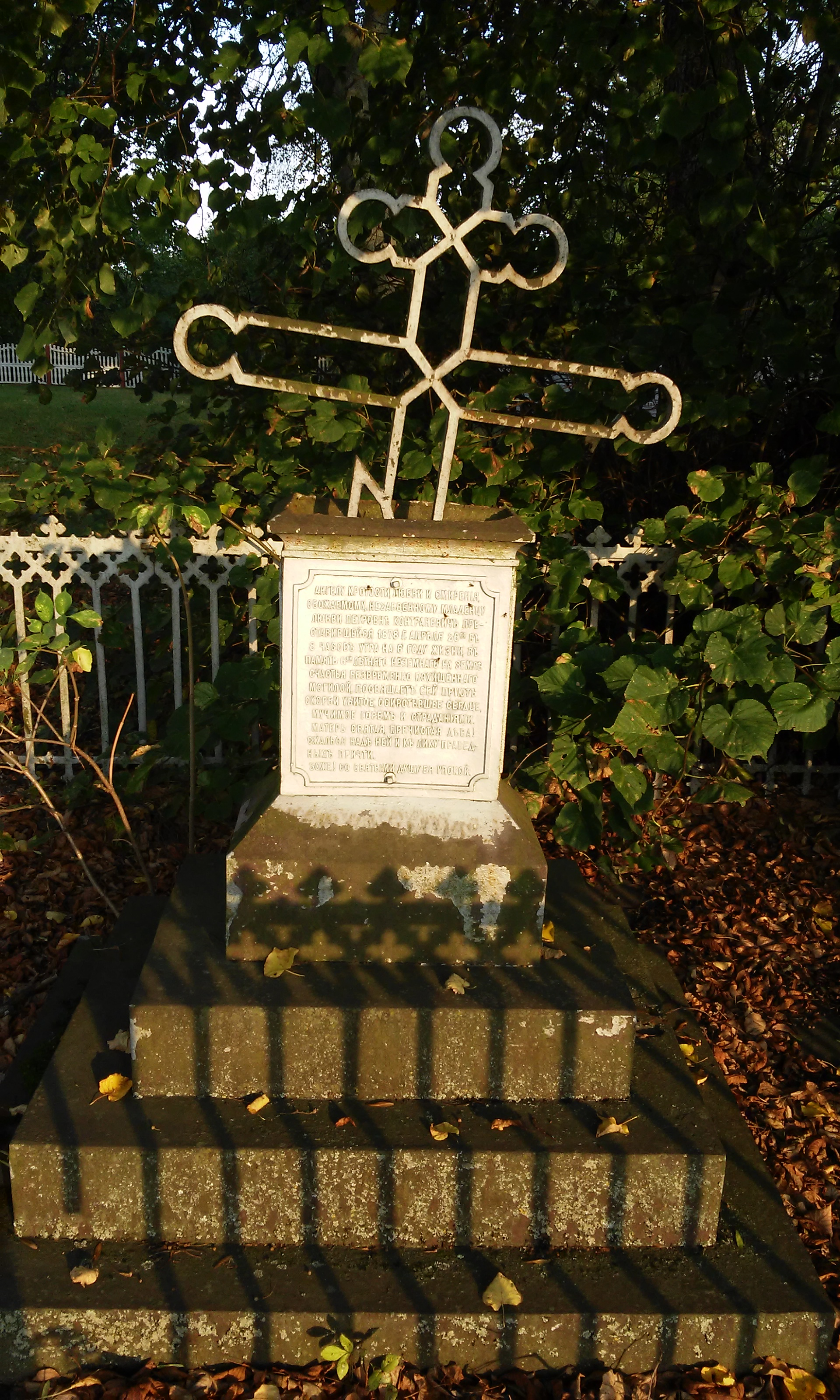 Nagrobek 6-letniej Lubow Kontraniewicz, córki miejscowego proboszcza, z rosyjską inskrypcją, przy dawnej cerkwi w Bezku